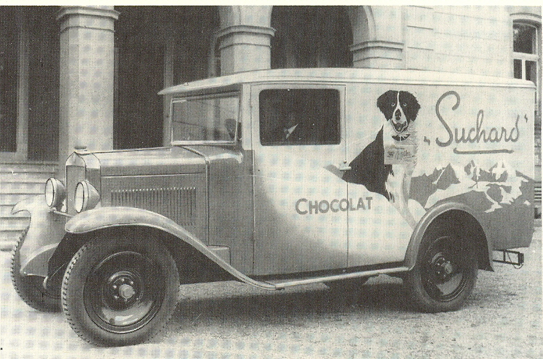 Fiat 514 Van (Long Wheel Base) (1929)